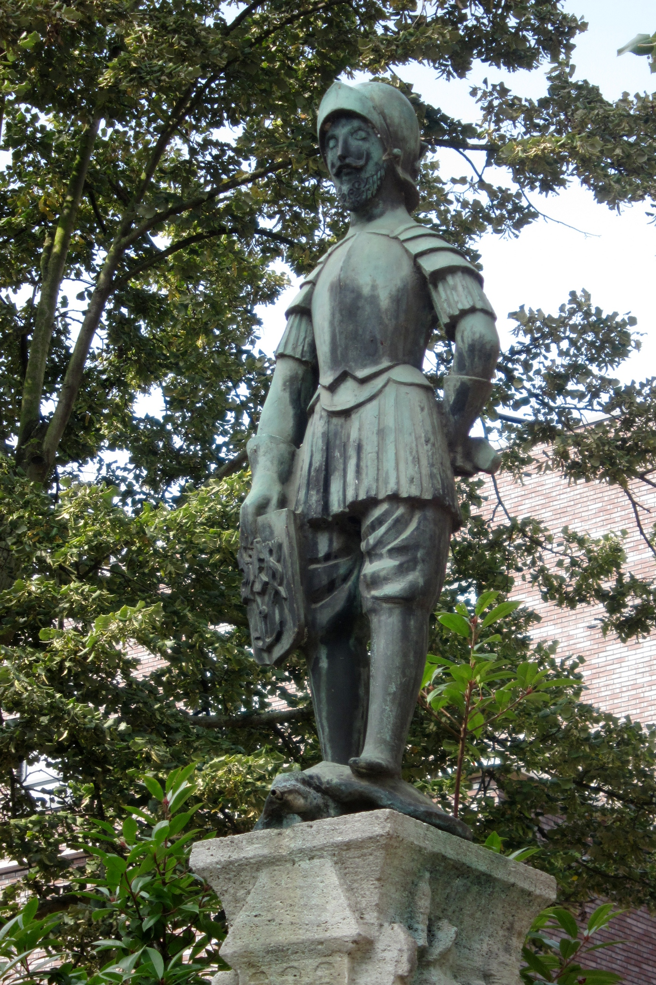 Schinkemenke on Kwartelenmarkt, Venlo, The Netherlands. Part of a fountain.